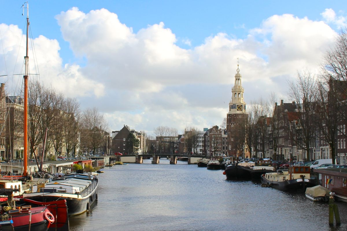 Waalseilandgracht en Montelbaanstoren in Amsterdam, vanaf brug 283 (Kraanboomsluisbrug)